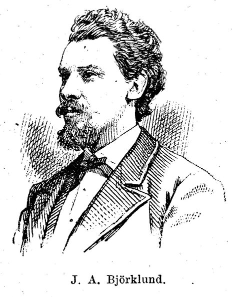 Björklund